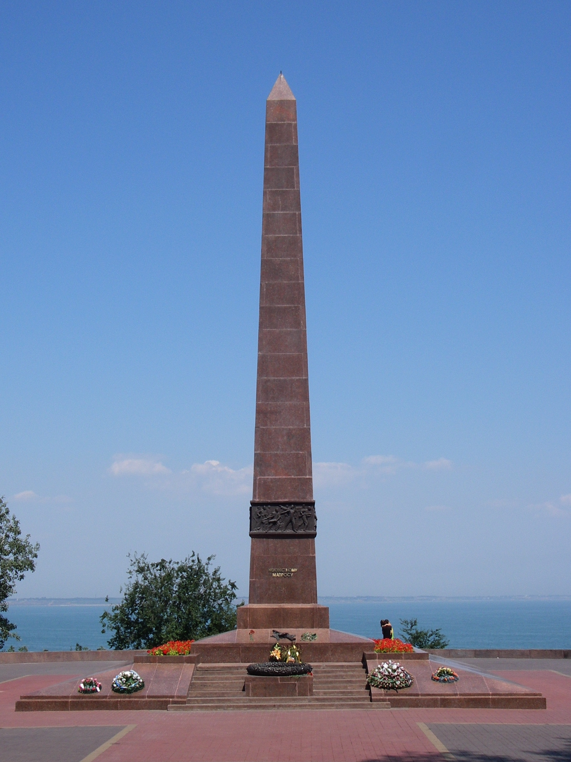 Odessa, Denkmal des unbekannten Matrosen